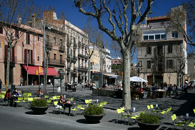 Plaça de Sarrià